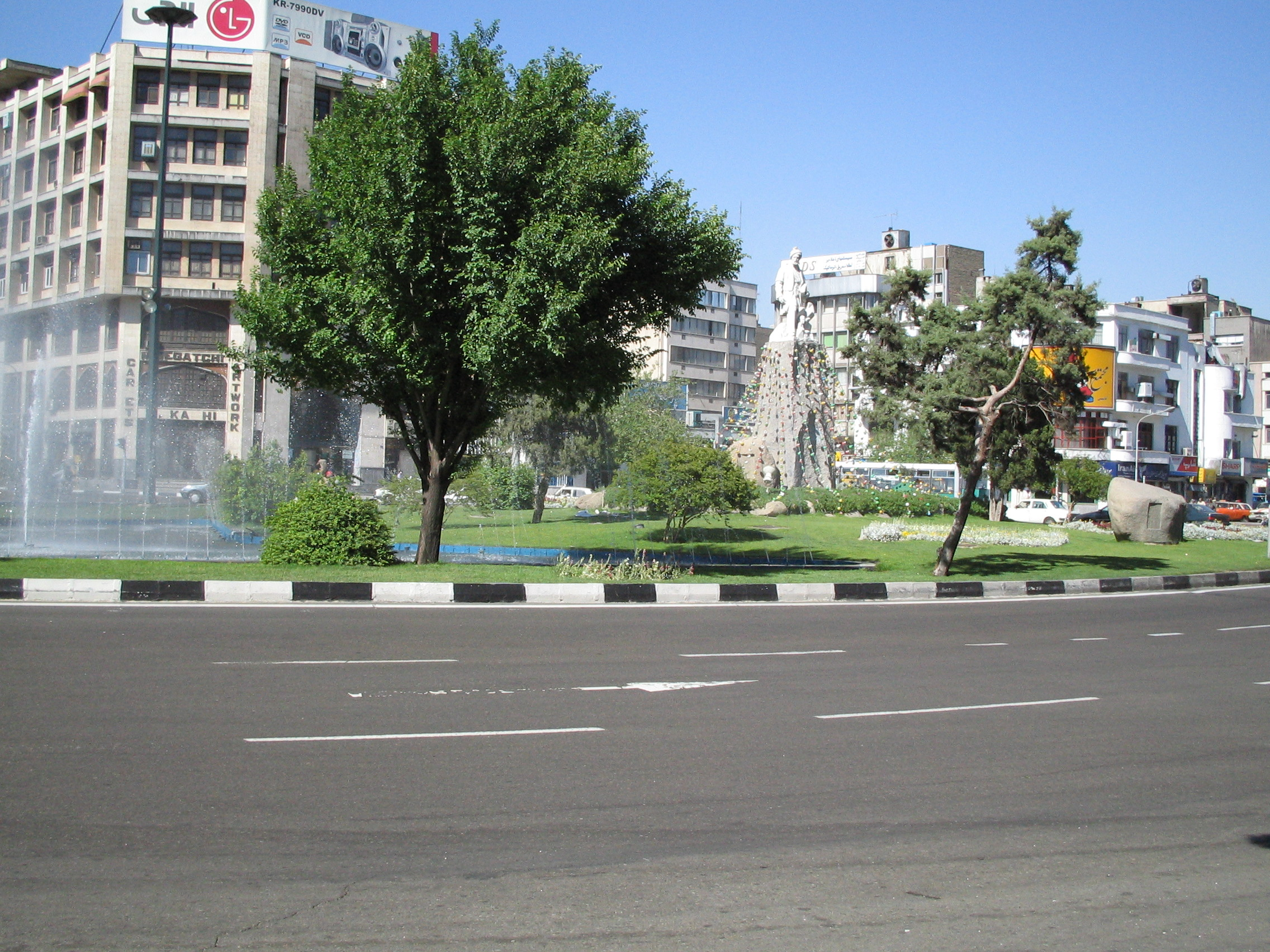 Meydan (Square) Ferdowsi in Tehran, Iran